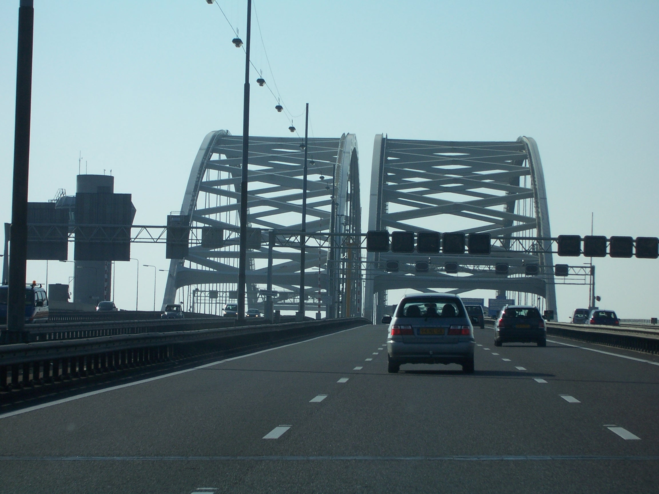 Brienoordbrug - Rotterdam - 2007